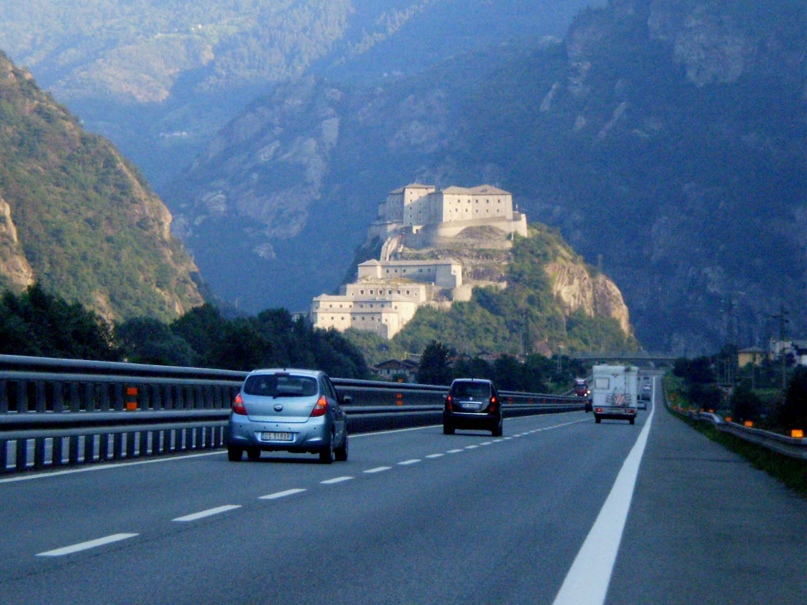 Forte di Bard dall'autostrada al tramonto - Valle di Aosta This is a photo of a monument which is part of cultural heritage of Italy.